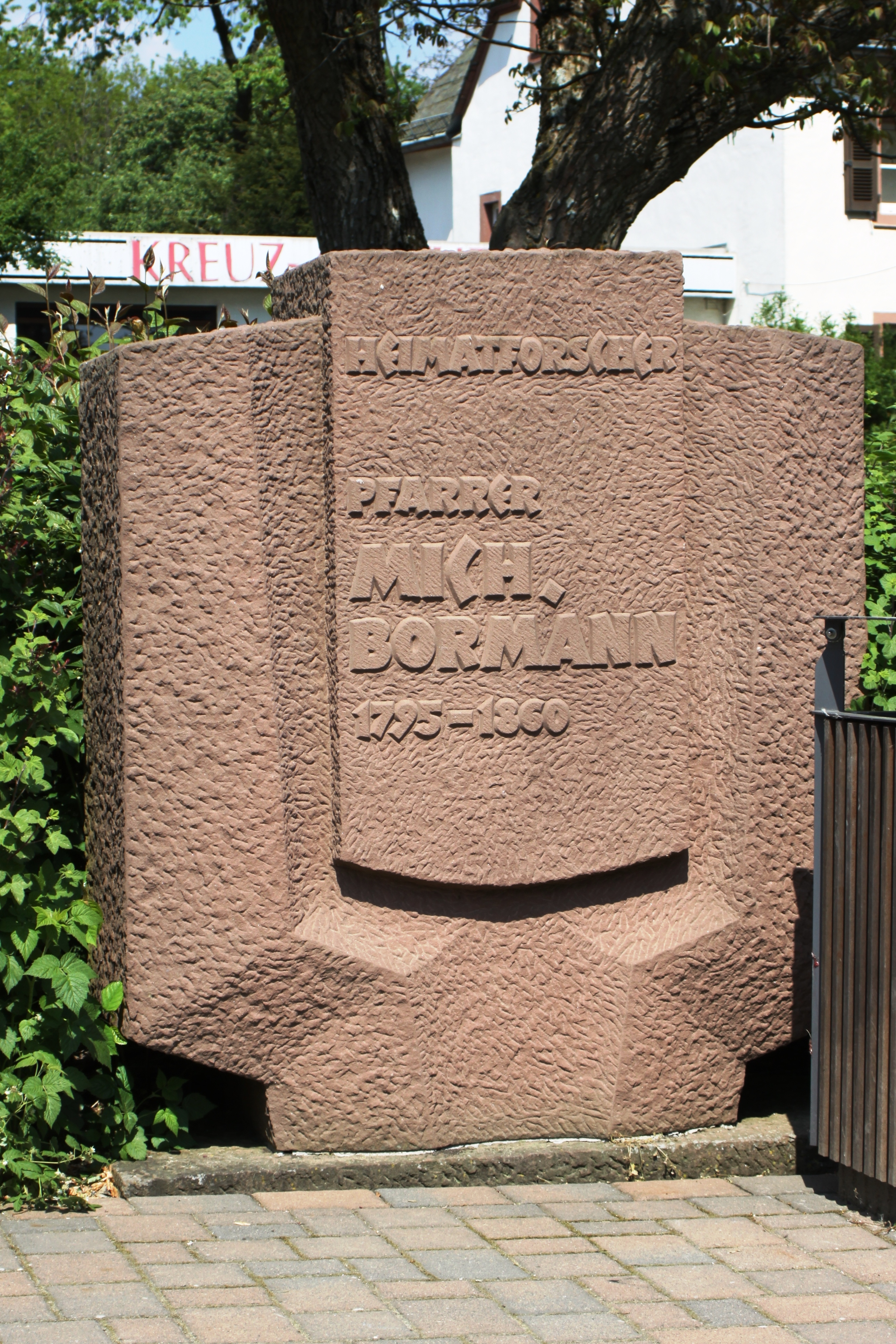 Denkmal für Mich. Bormann in Daleiden